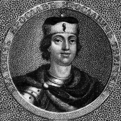 Вел. князь Ярослав Ярославич Тверской.